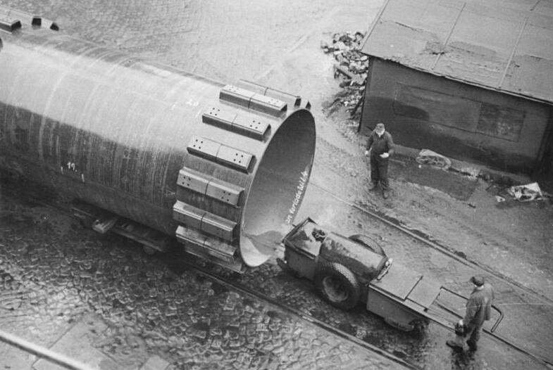 Zentralbild-Biscan Me 24.11.1959 Stahlriesen fürs Chemieprogramm Der Schwermaschinenbau "Georgi Dimitroff" in Magdeburg baut als Spezialität Großbehälter und Großapparate für die Chemie-Industrie des sozialistischen Lagers. U-B.z. Einer der sechs Bauteile der 43 Meter langen Karbidtrockentrommel für das Buna-Werk wird zum Abtransport bereitgestellt. Die Trockentrommel wird ein Gesamtgewicht von rund 100 000 Kilogramm haben, der Transport wird auf sechs Spezialwaggons erfolgen.